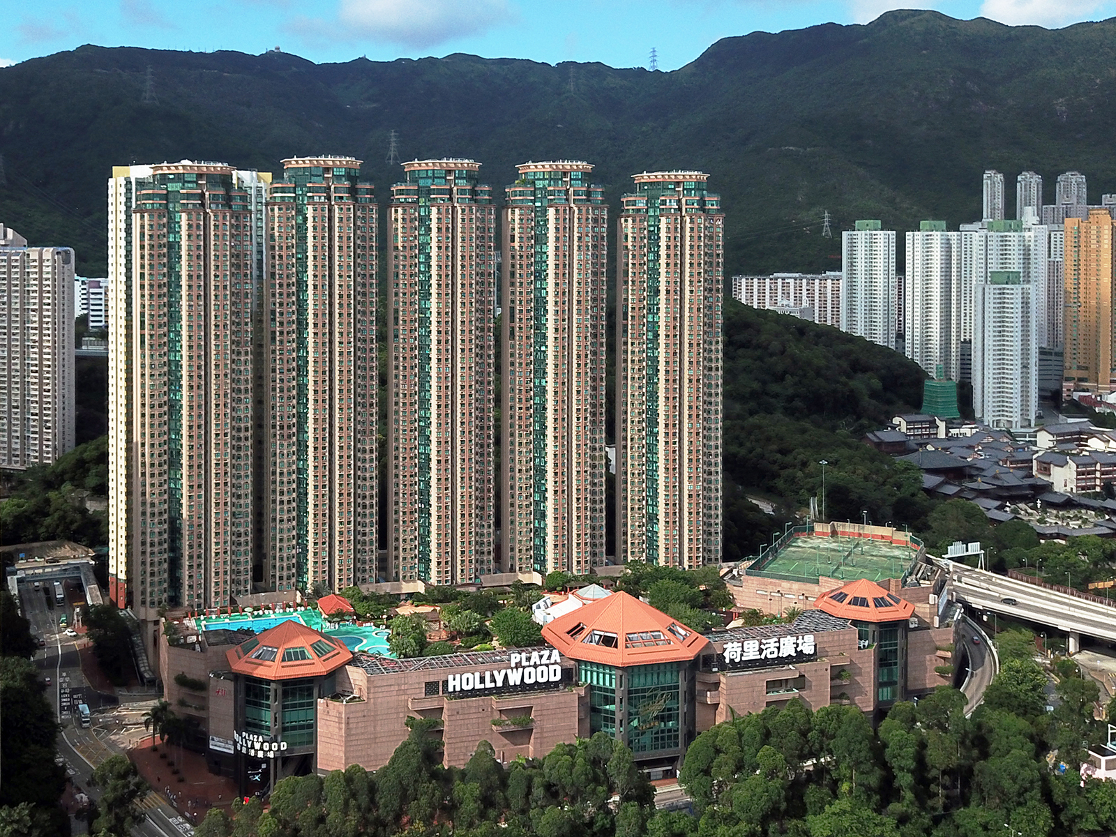 The Galaxy